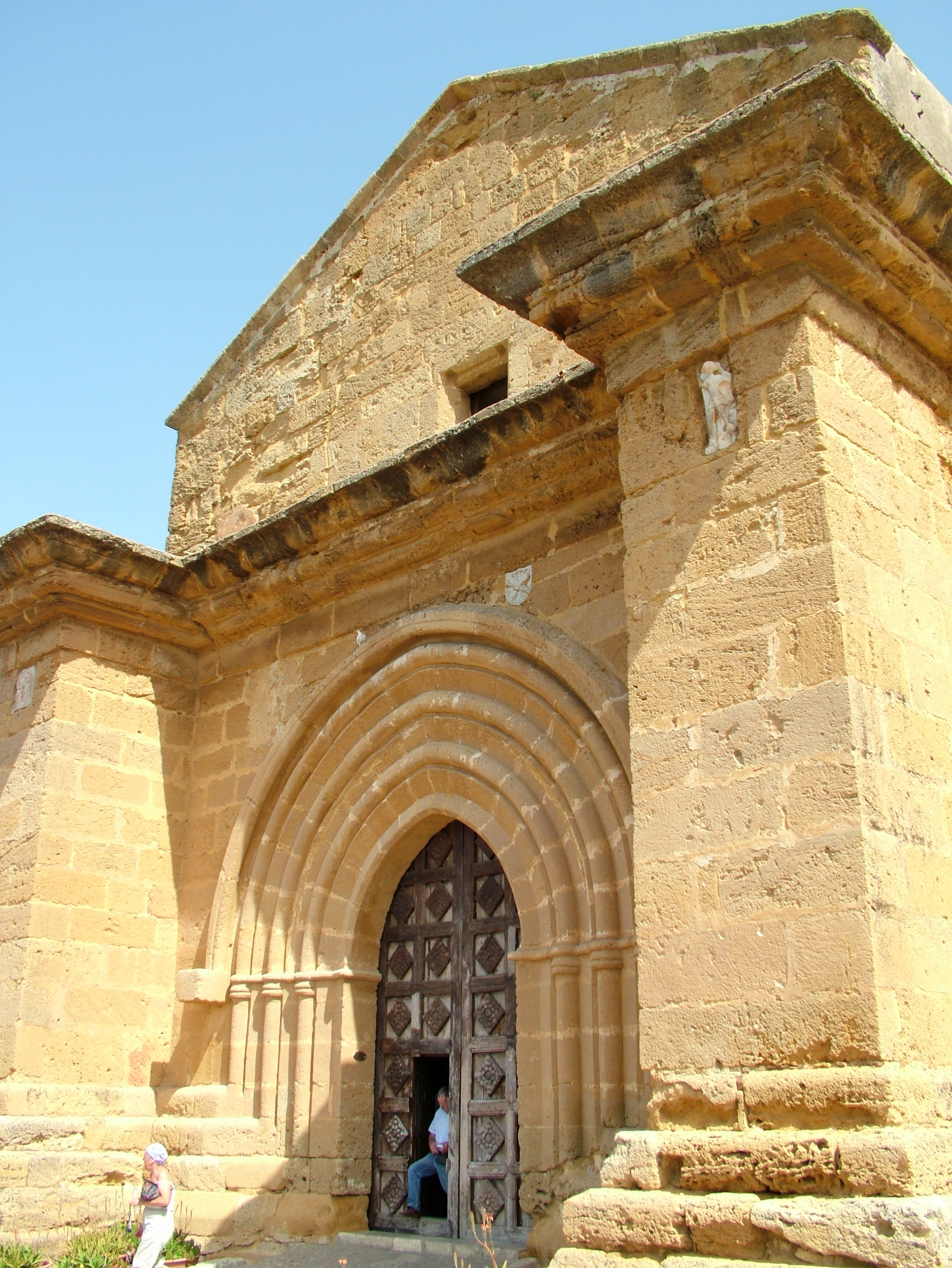 Agrigent, Sizilien, Kirche S. Nicola am Archeologischen Museum